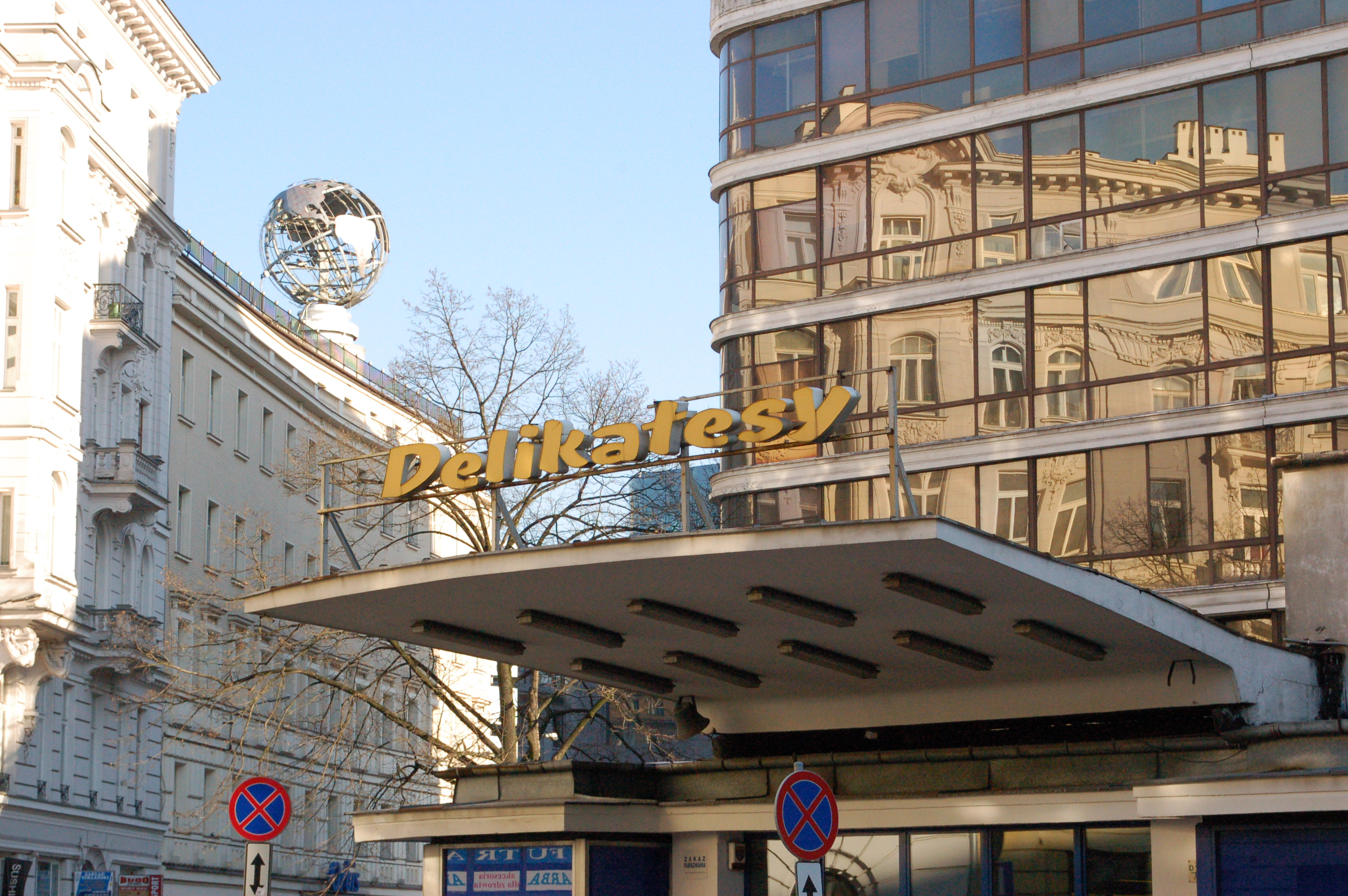 Smyk, Jerozolimskie-Alle, Warschau